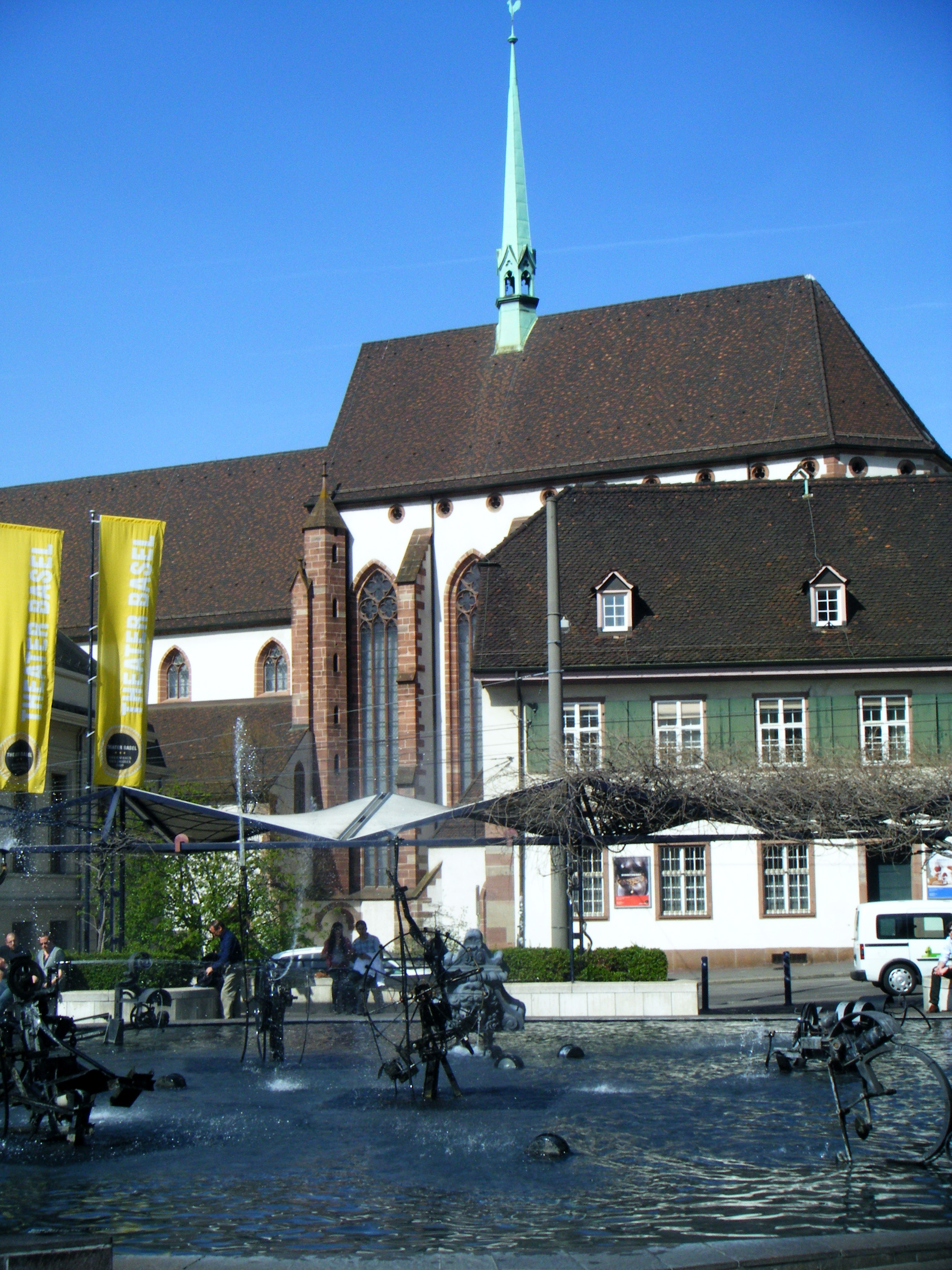 Der Fasnachts-Brunnen (auch: Tinguely-Brunnen bzw. Carnaval) Basel/Schweiz